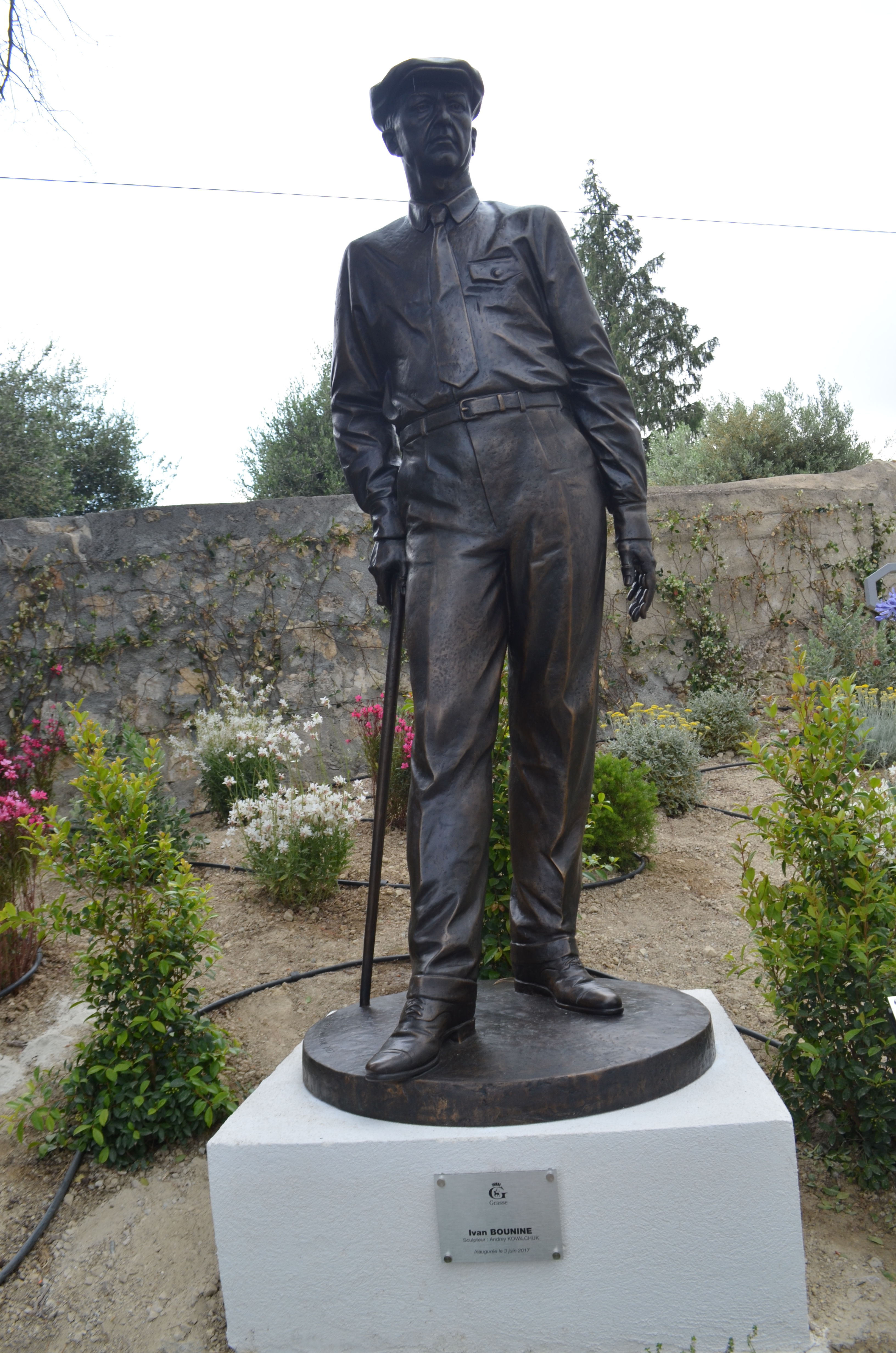 la statue d'Ivan Bounine à Grasse